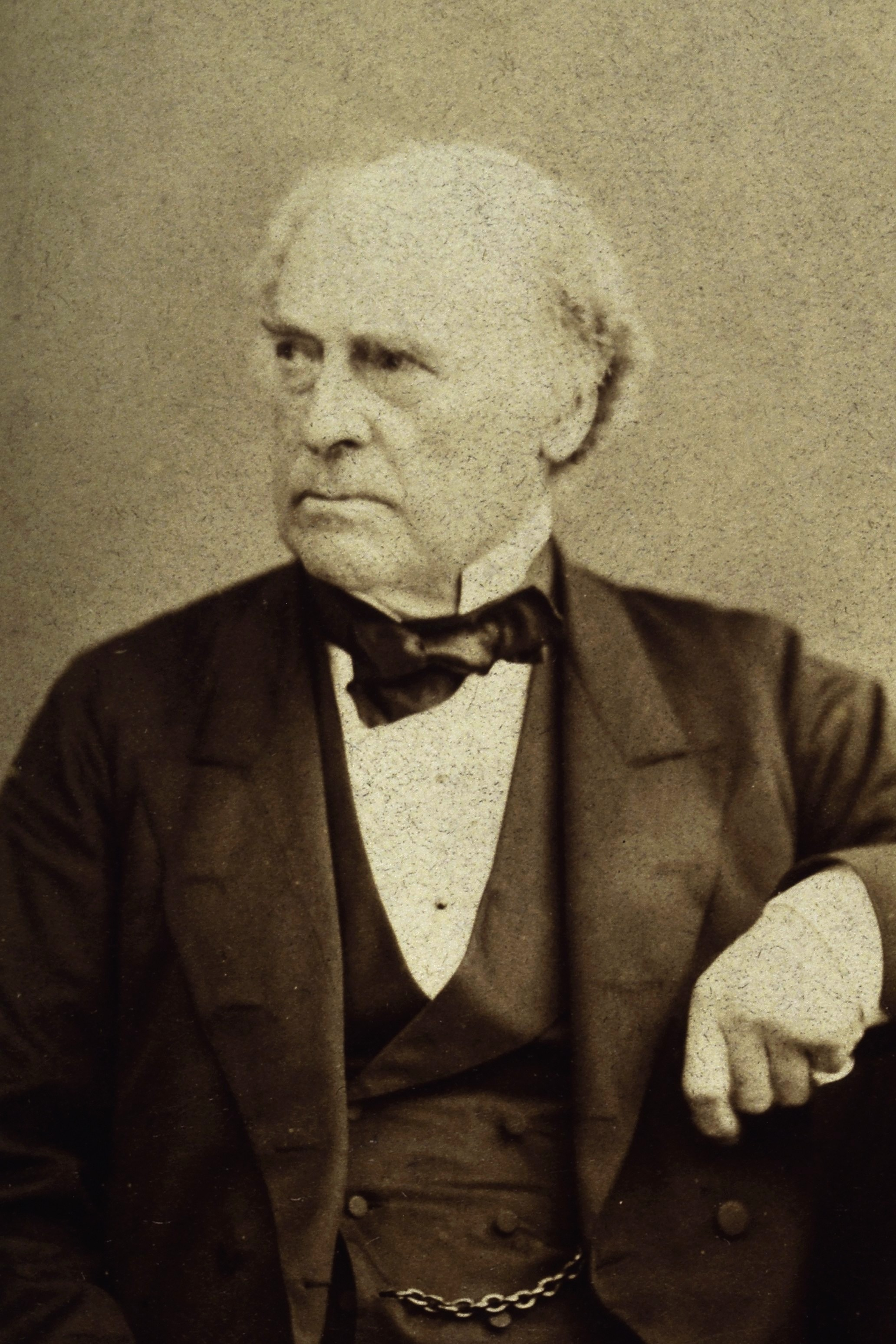 Frederic Carpenter Skey